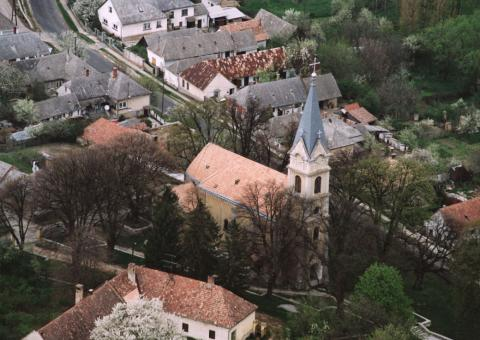 Preĝejo de Bakonyoszlop.